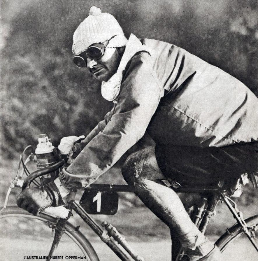 L'Australien Hubert Opperman, vainqueur de Paris-Brest-Paris 1931 (septembre).